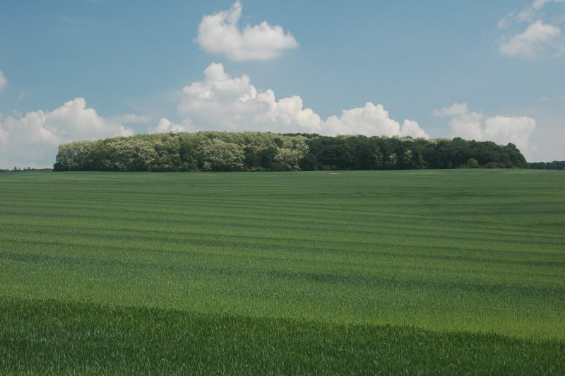 Zámčisko